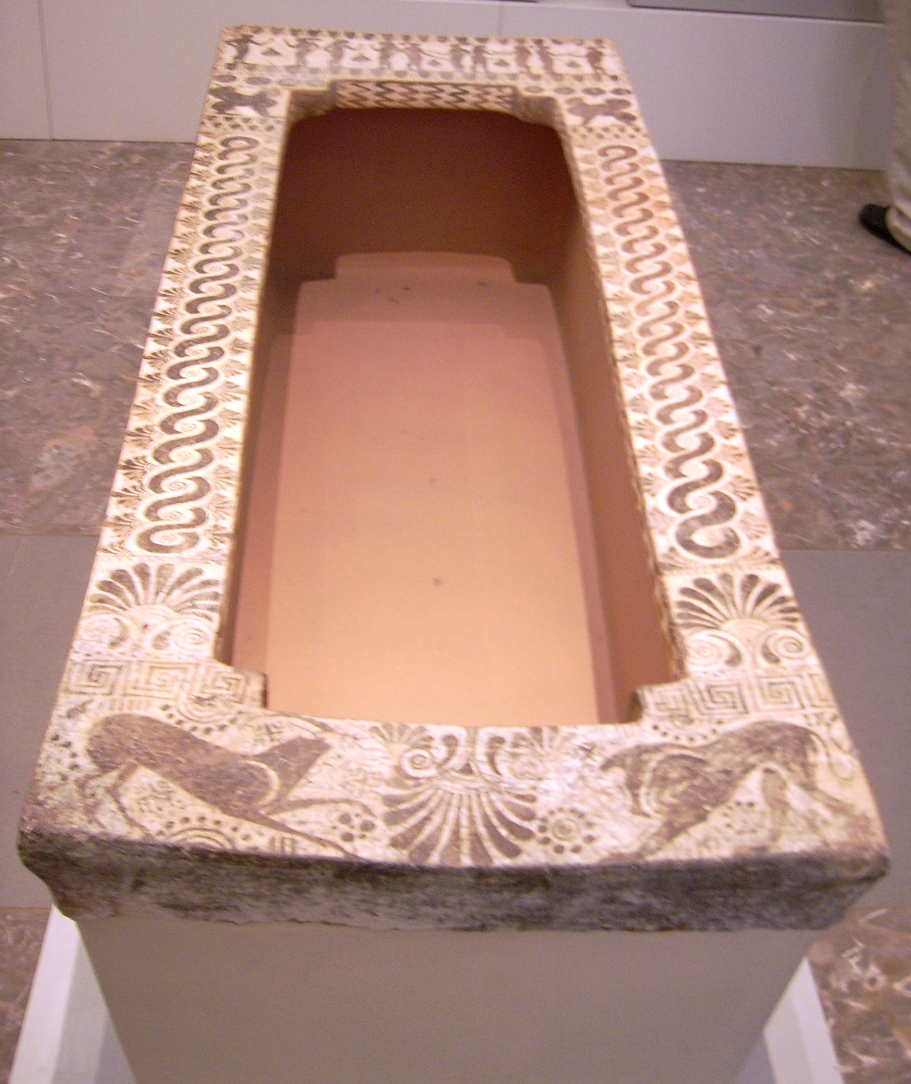 Klazomenischer Sarkophag aus Klazomenai mit homoerotischer Szene adeliger Jünglinge im Kopfteil; Länge 195 cm, Breite 74/62 cm, Tiefe 33,5 cm; bemalt im schwarzfigurigen Stil; Inv.-Nr.: 30030, Antikensammlung Berlin/Altes Museum